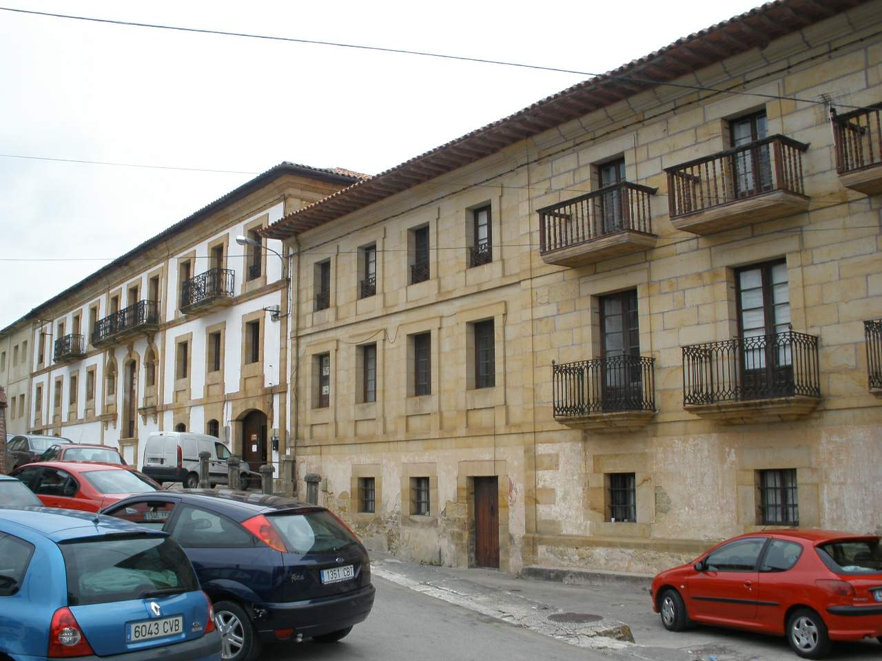 Cóbreces (Cantabria)